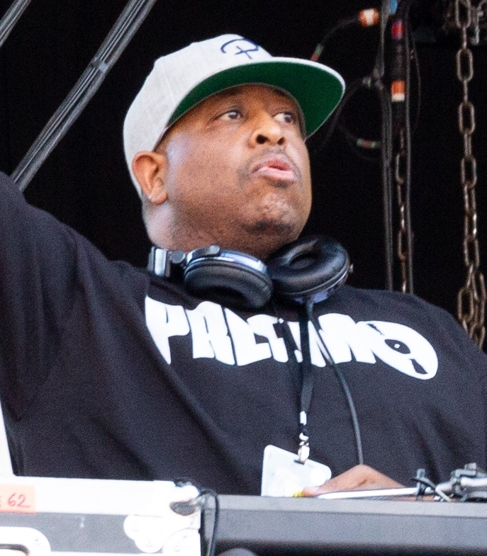 DJ Premier in Berlin, May 2019